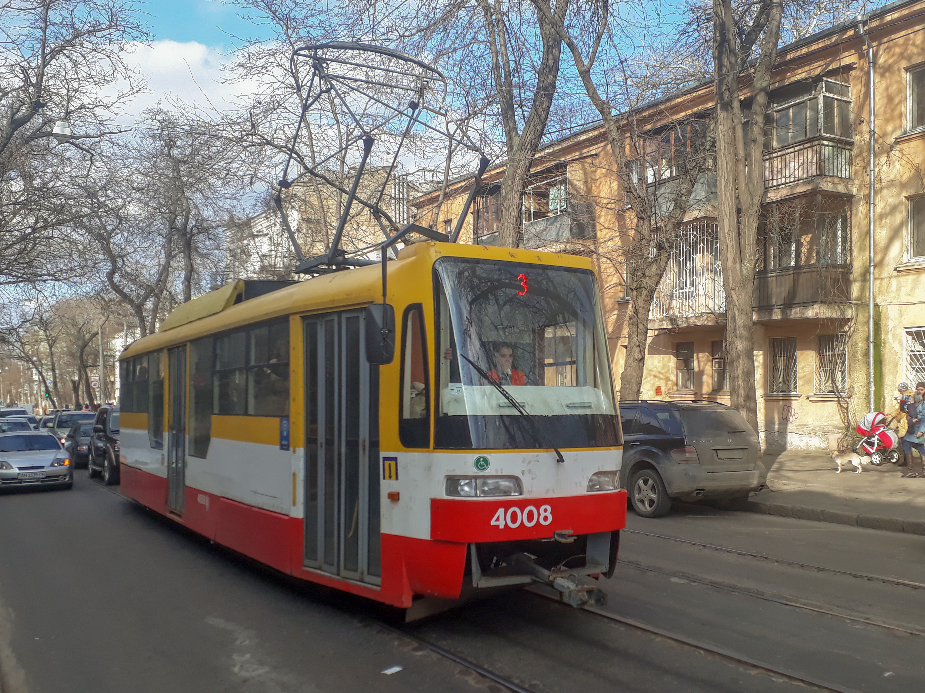 Трамвай Т3 Квп-Од 4008 на улице Старопортофранковской